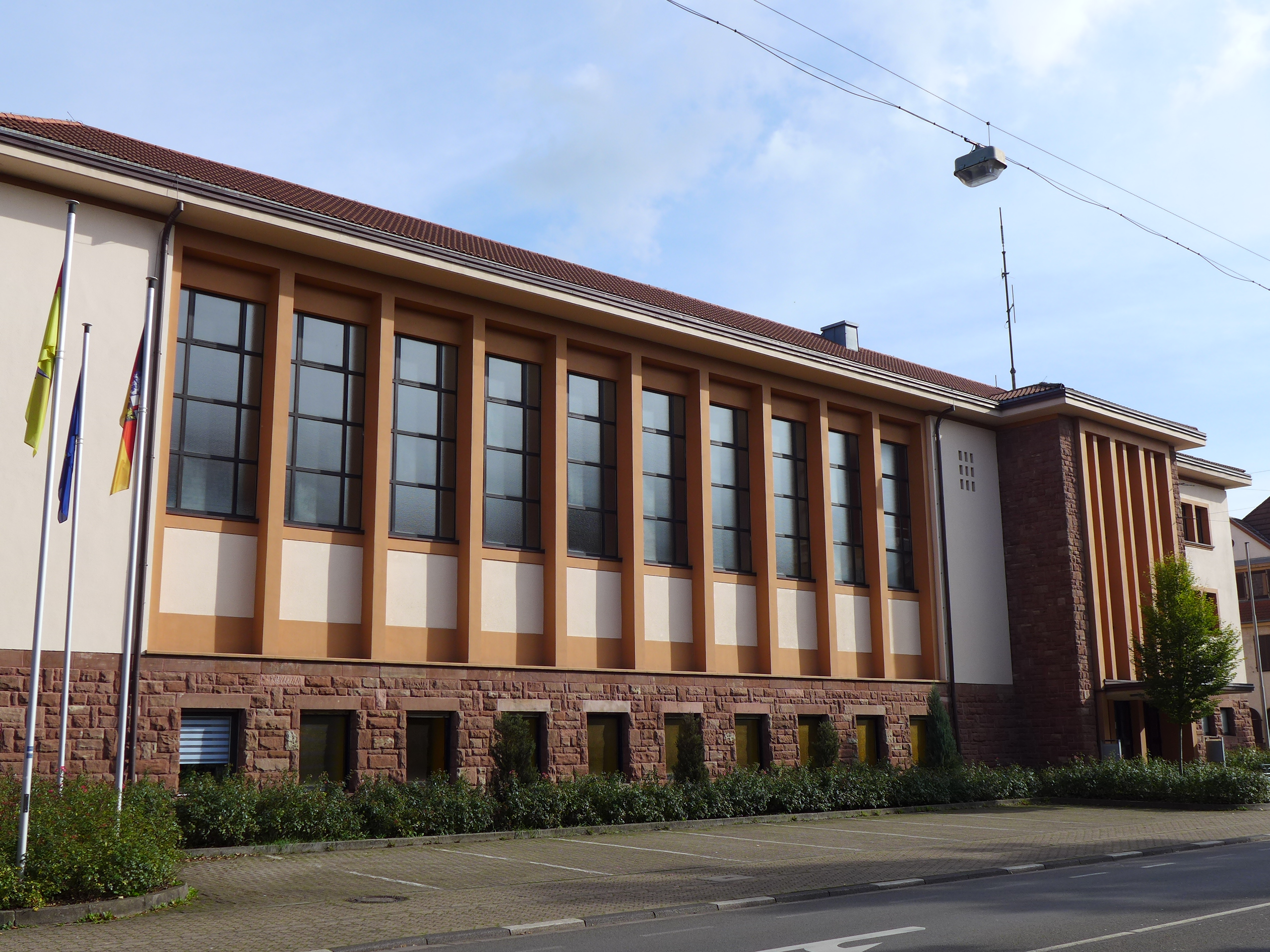 Gebäudes des alten Gymnasiums, nach Kriegsbeschädigung zur Turnhalle umgebaut